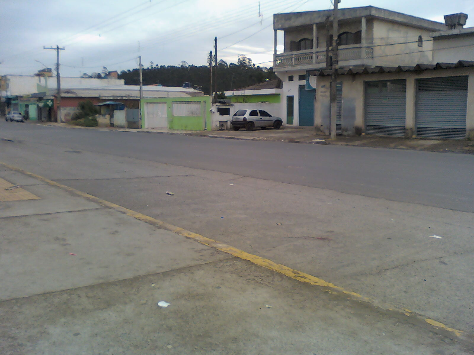 Avenida "B" no bairro Parque Rodrigo Barreto no município brasileiro de Arujá, no Estado de São Paulo